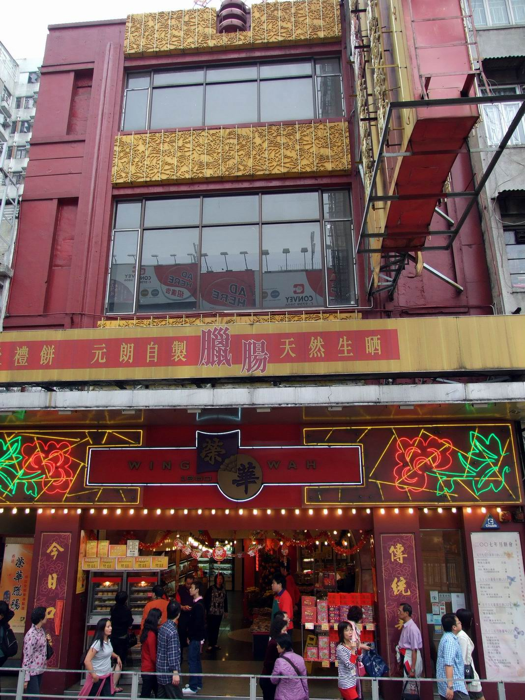 元朗榮華總店